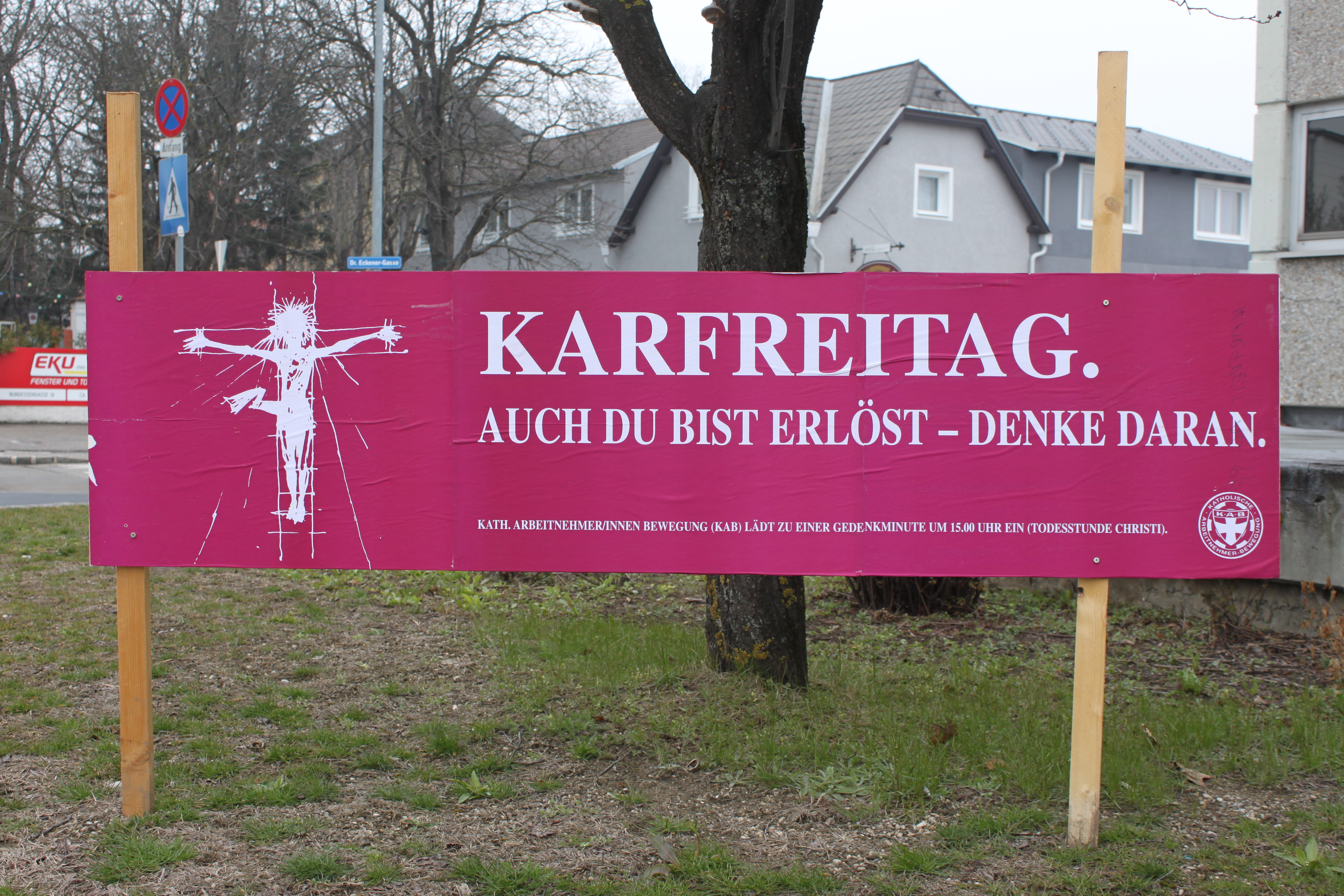 Plakat-Aktion der KAB in Österreich zum Karfreitag 2013 in Wiener Neustadt